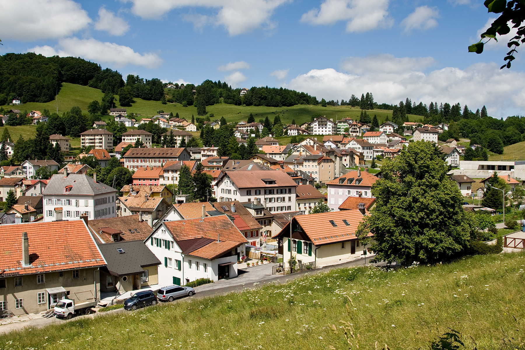 Sainte-Croix ist berühmt für die hier hergestellten Musik-Spieldosen.